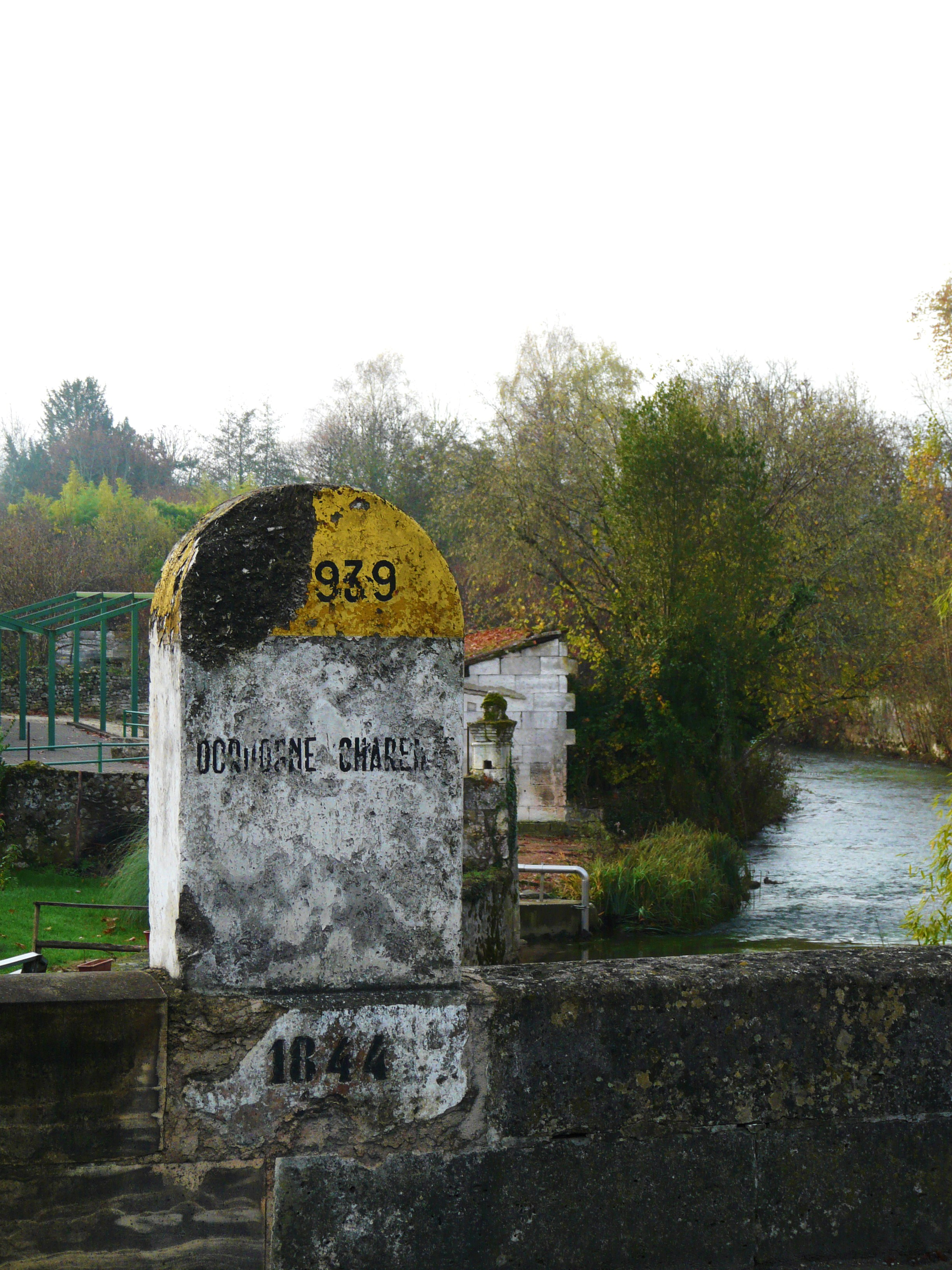 Borne de la route départementale 939 sur le pont franchissant la Nizonne entre Édon (Charente) et La Rochebeaucourt-et-Argentine (Dordogne)